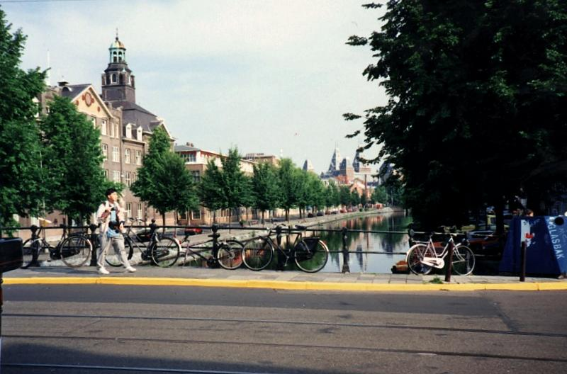 Boerenwetering gezien vanaf Brug 137 in de richting van het Rijksmuseum.